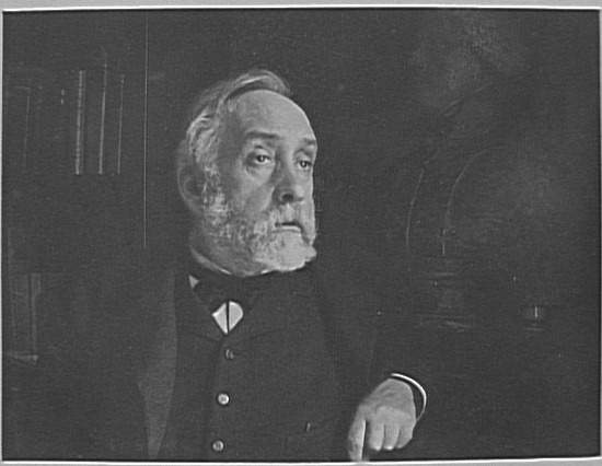 Edgar Degas (1834-1917), französischer Maler. Fotografisches Selbstporträt.